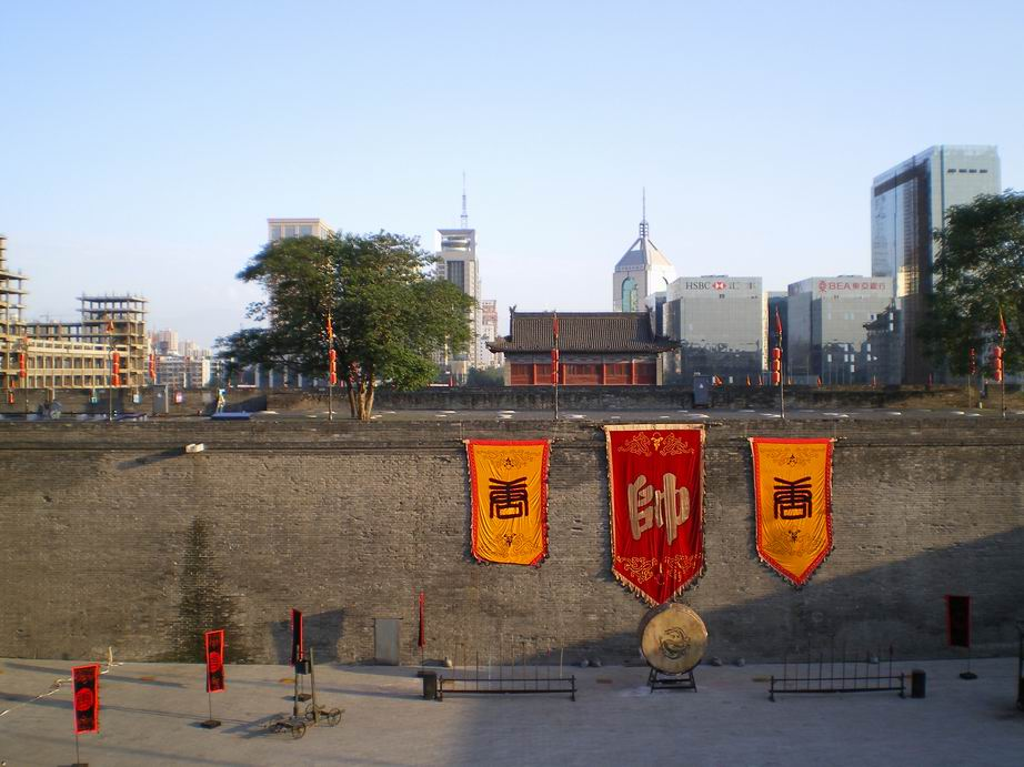 חומות העיר בשיאן, שאנשי, סין רישיון נוצר על ידי משתמש:Gsella